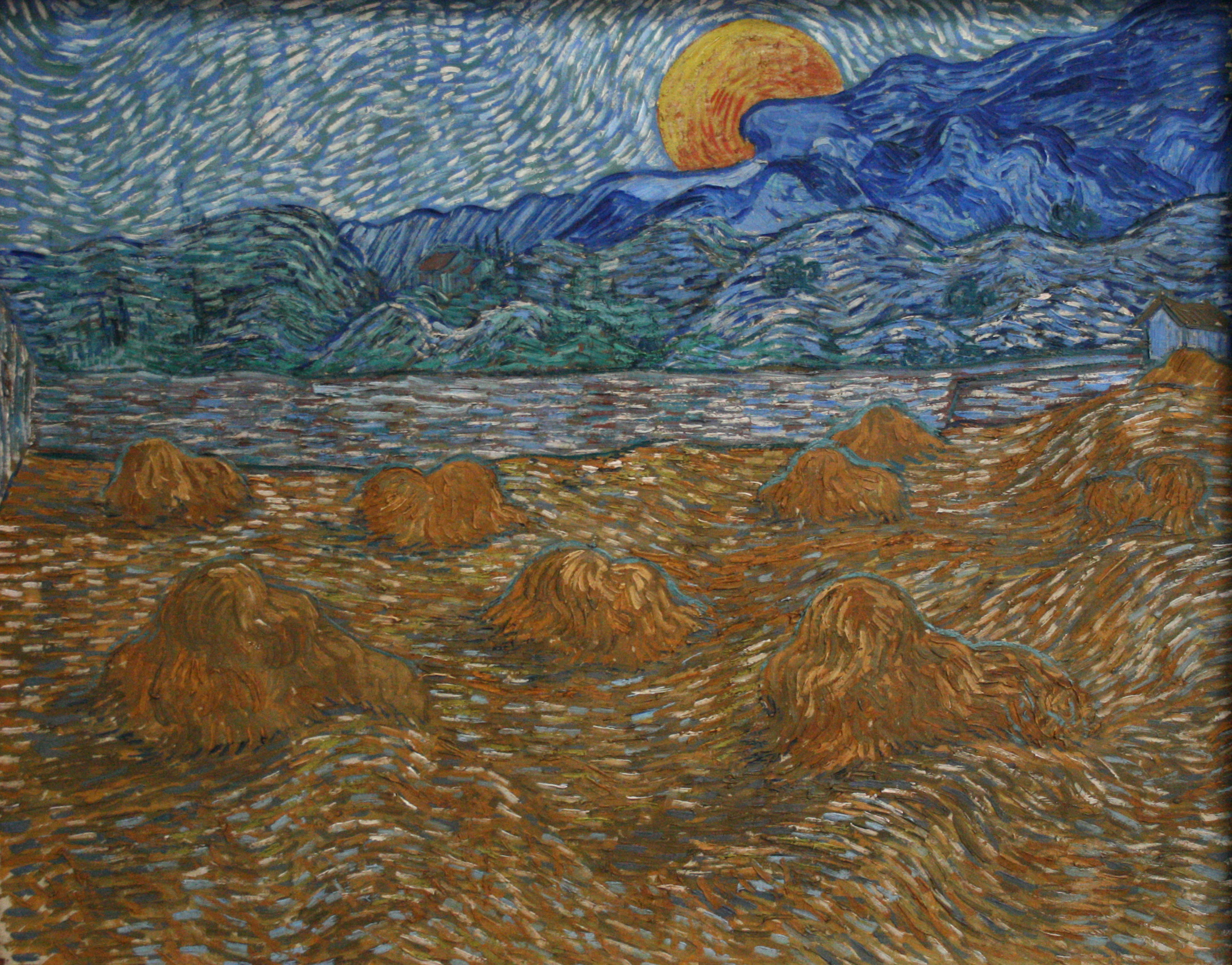 Landscape with wheat sheaves and rising moon; nl: Landschap met korenschelven en opkomende maan